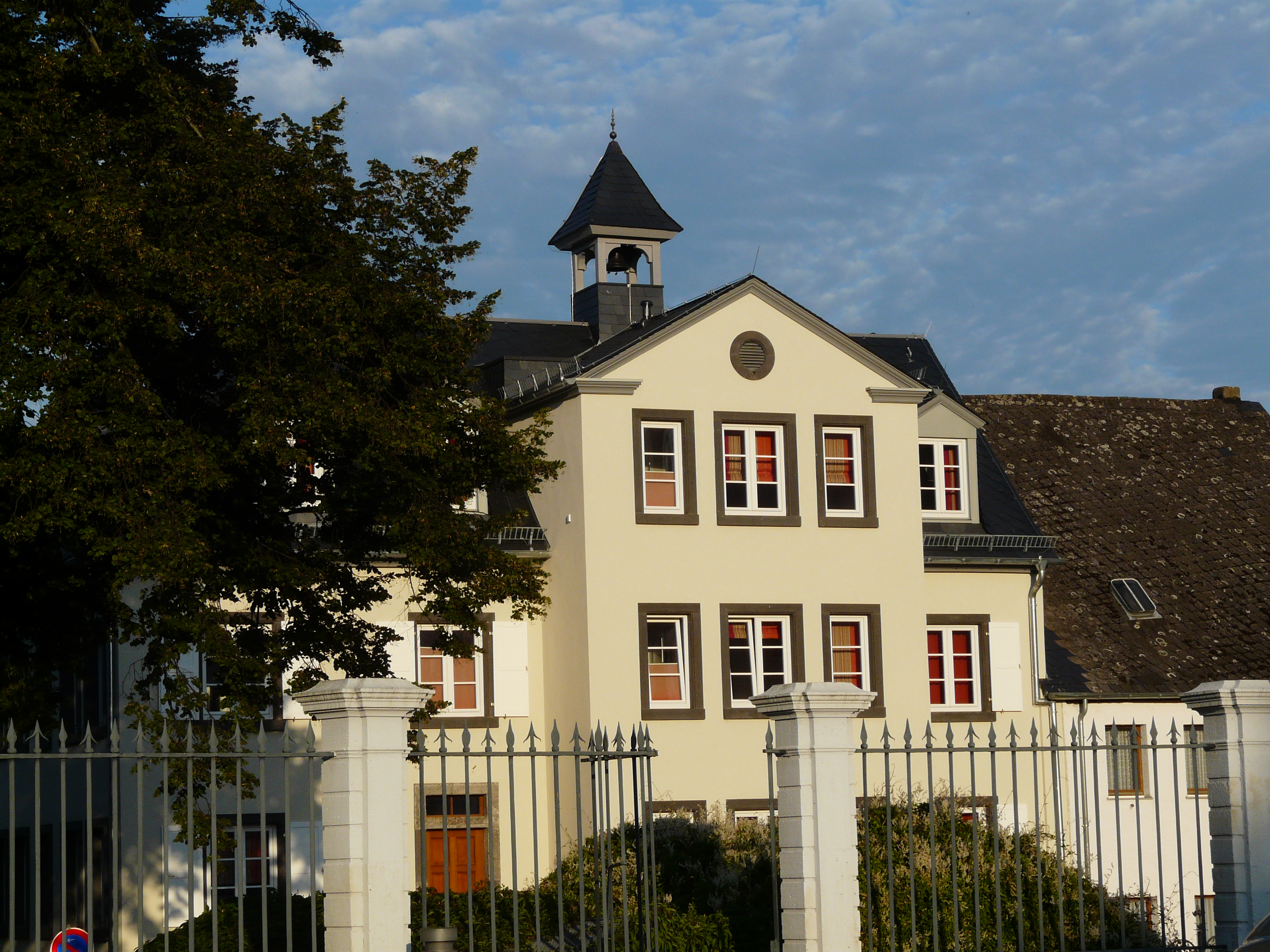 Der Musikerhof, das Gästehaus der Landesmusikakademie Rheinland-Pfalz in Neuwied-Engers, mit der Glocke St. Antonius.